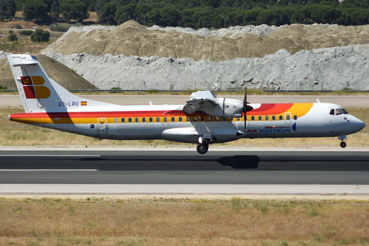 ATR 72-600 aterrizando en Madrid Barajas